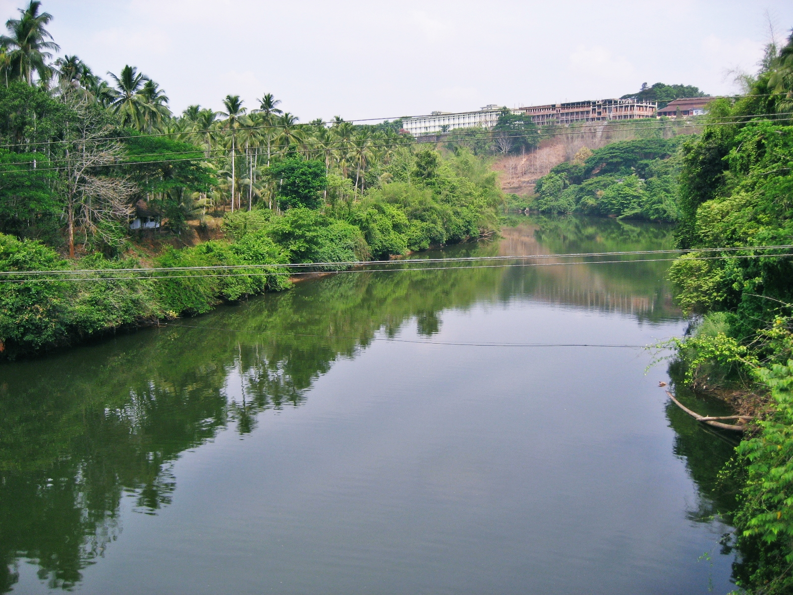 Kadalundi River